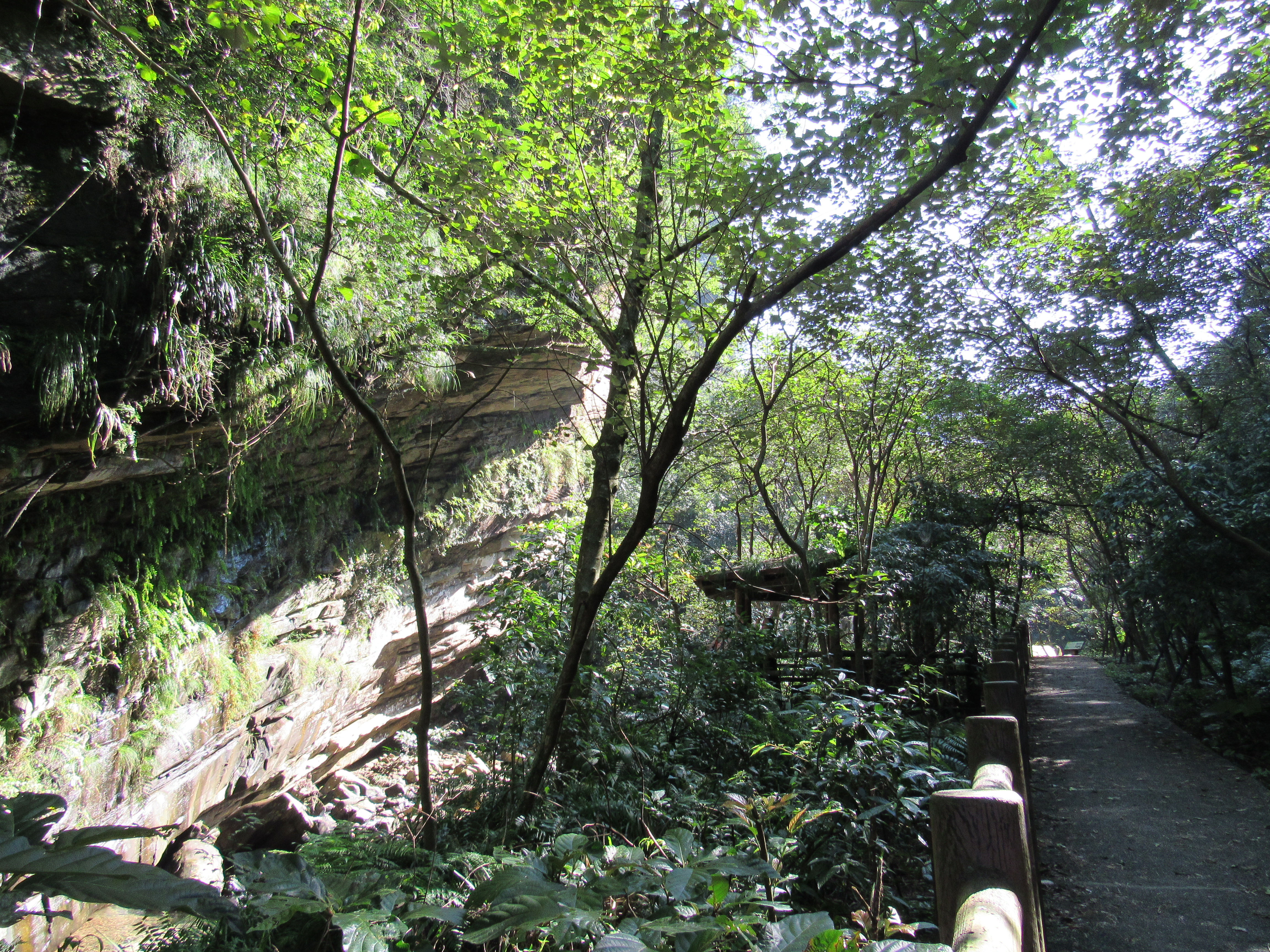 中文（台灣）: 暖東峽谷走道一景